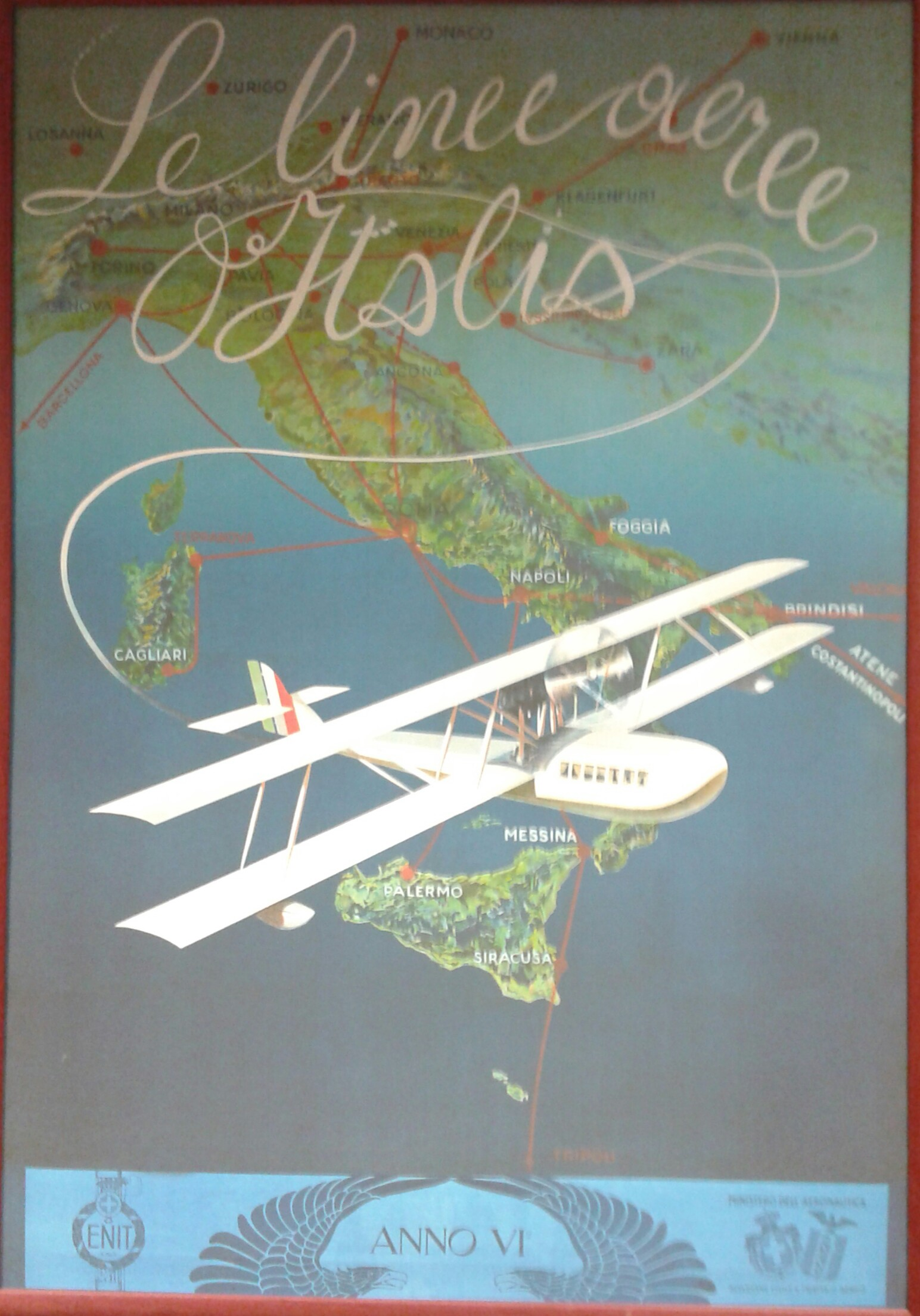 Manifesto pubblicitario de Le Linee Aeree d'Italia di Mario Borgoni 1927